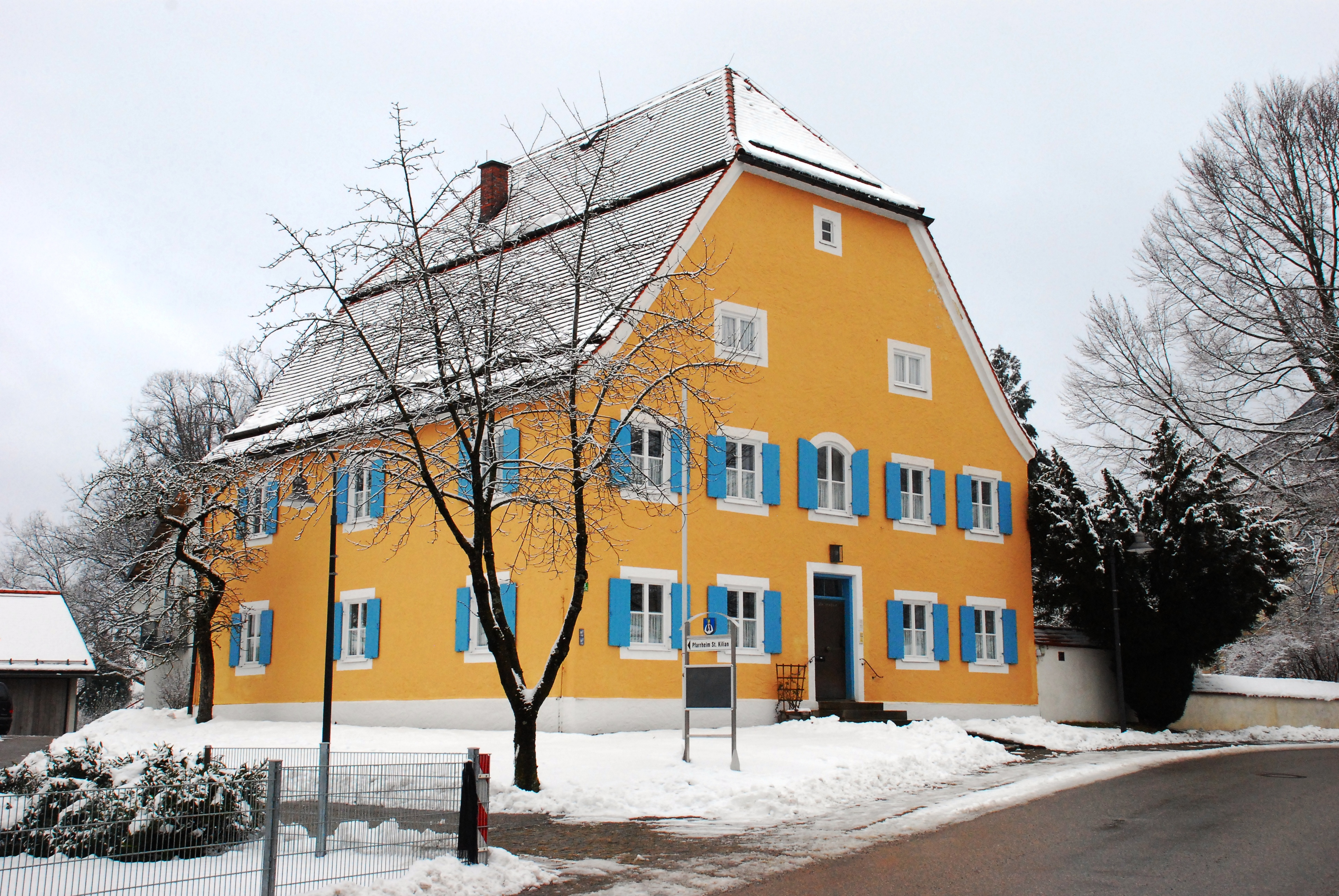 Pfarrhaus in Bad Heilbrunn, Landkreis Bad Tölz-Wolfratshausen, Regierungsbezirk Oberbayern, Bayern. Als Baudenkmal in der Bayerischen Denkmalliste aufgeführt.